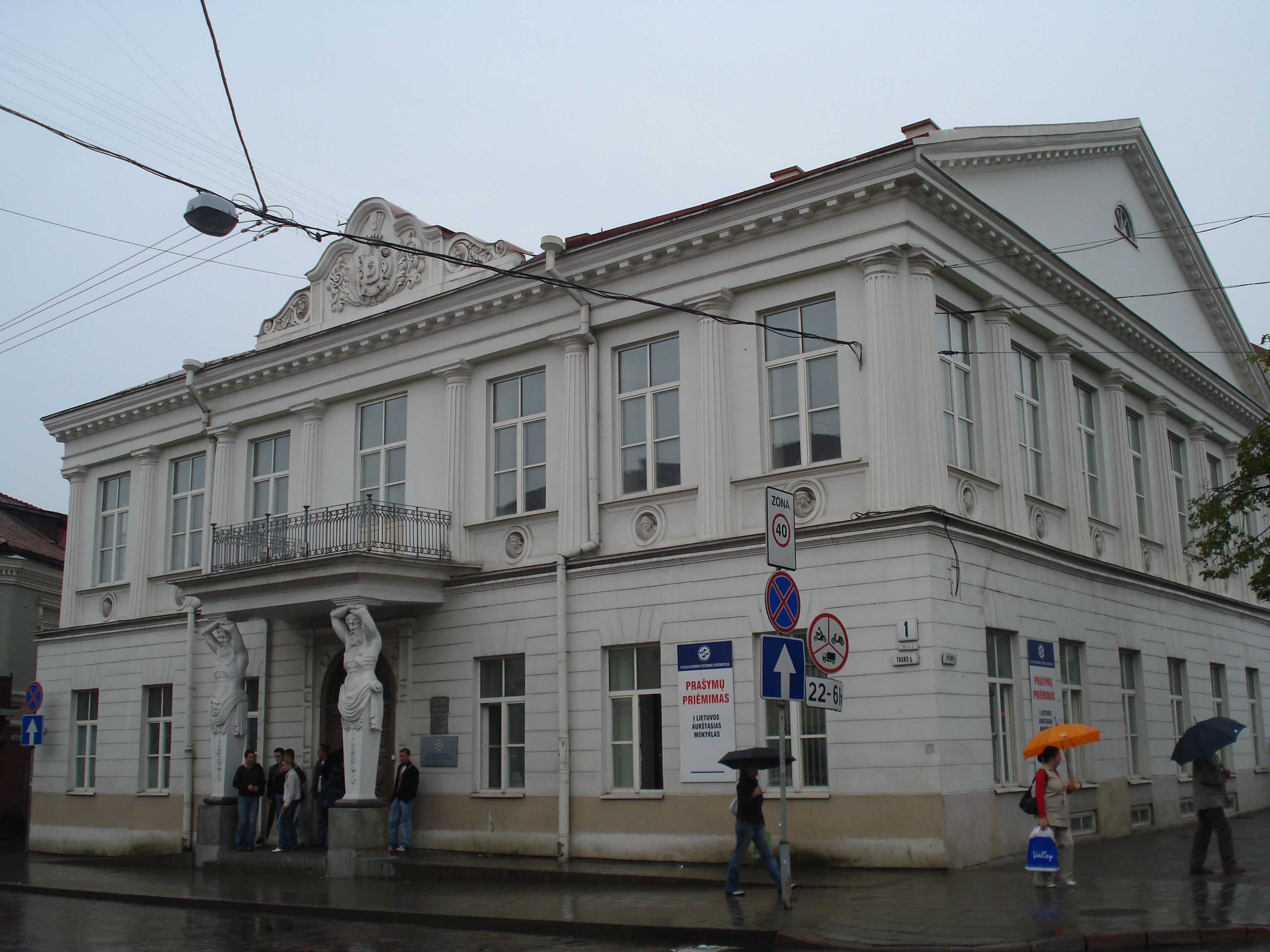 Tyszkiewicz Palace in Vilnius